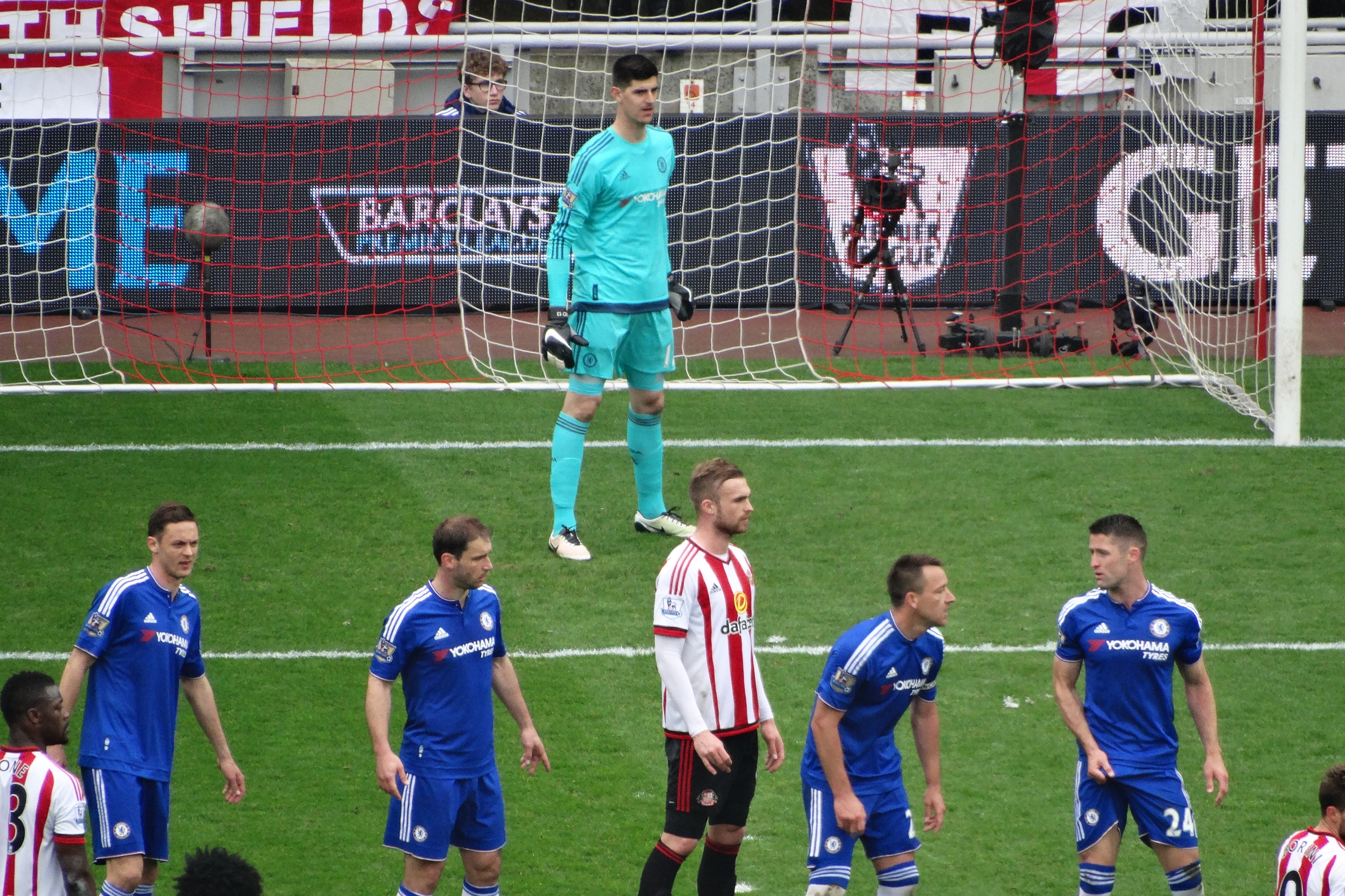 Sunderland 3 Chelsea2